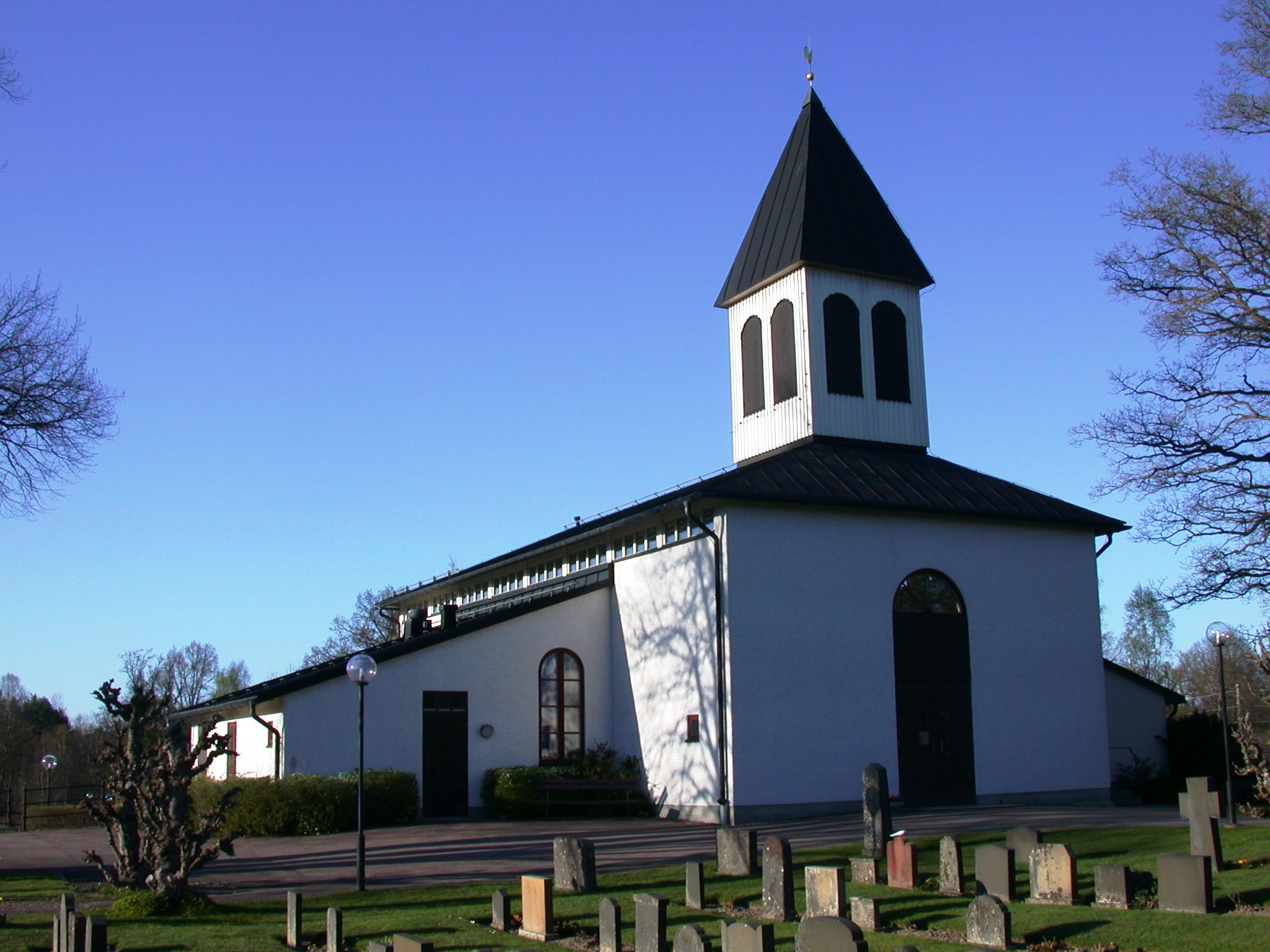 Hälleberga church, Nybro, Sweden